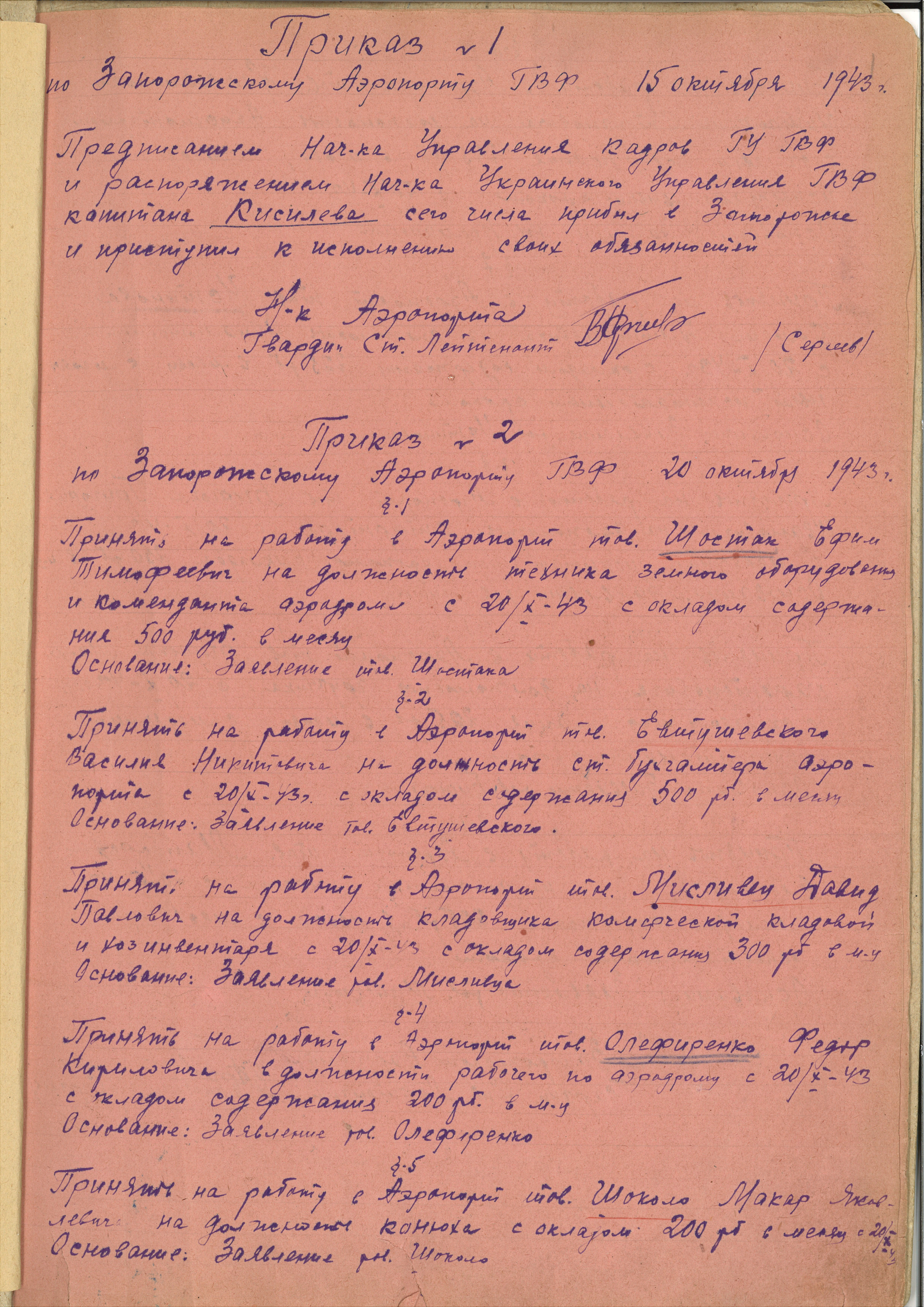 Відсканована копія першого наказу по підприємству виданого у 1943 році.